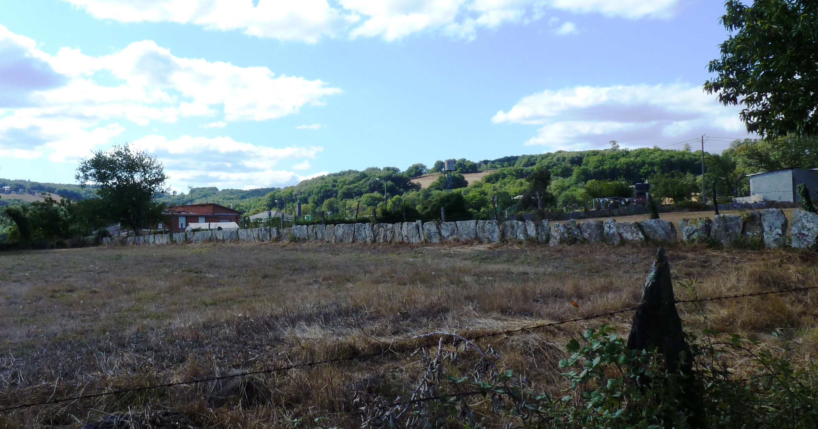 A Pedragosa, parroquia da Cervela, concello do Incio, Lugo. "Vargado": valado feito con vargos, lousas grandes